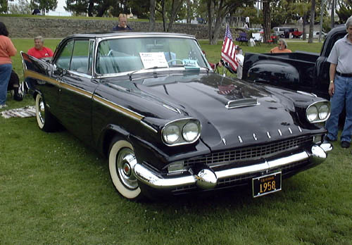 1958 Packard 2-door hardtop (model 58L-J8).